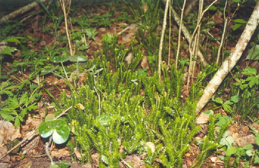 Huperzia selago (Lycopodiaceae)